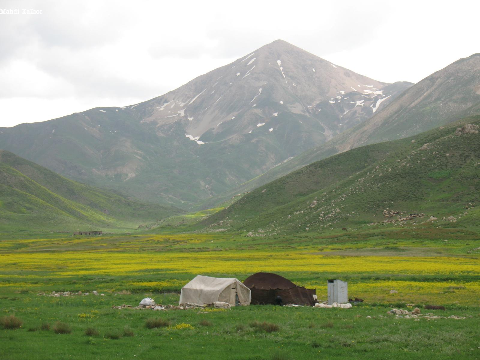 "Ashayer" tent in "Sefidab" Field,Lar چادرهای عشایردردشت سفیداب،لار